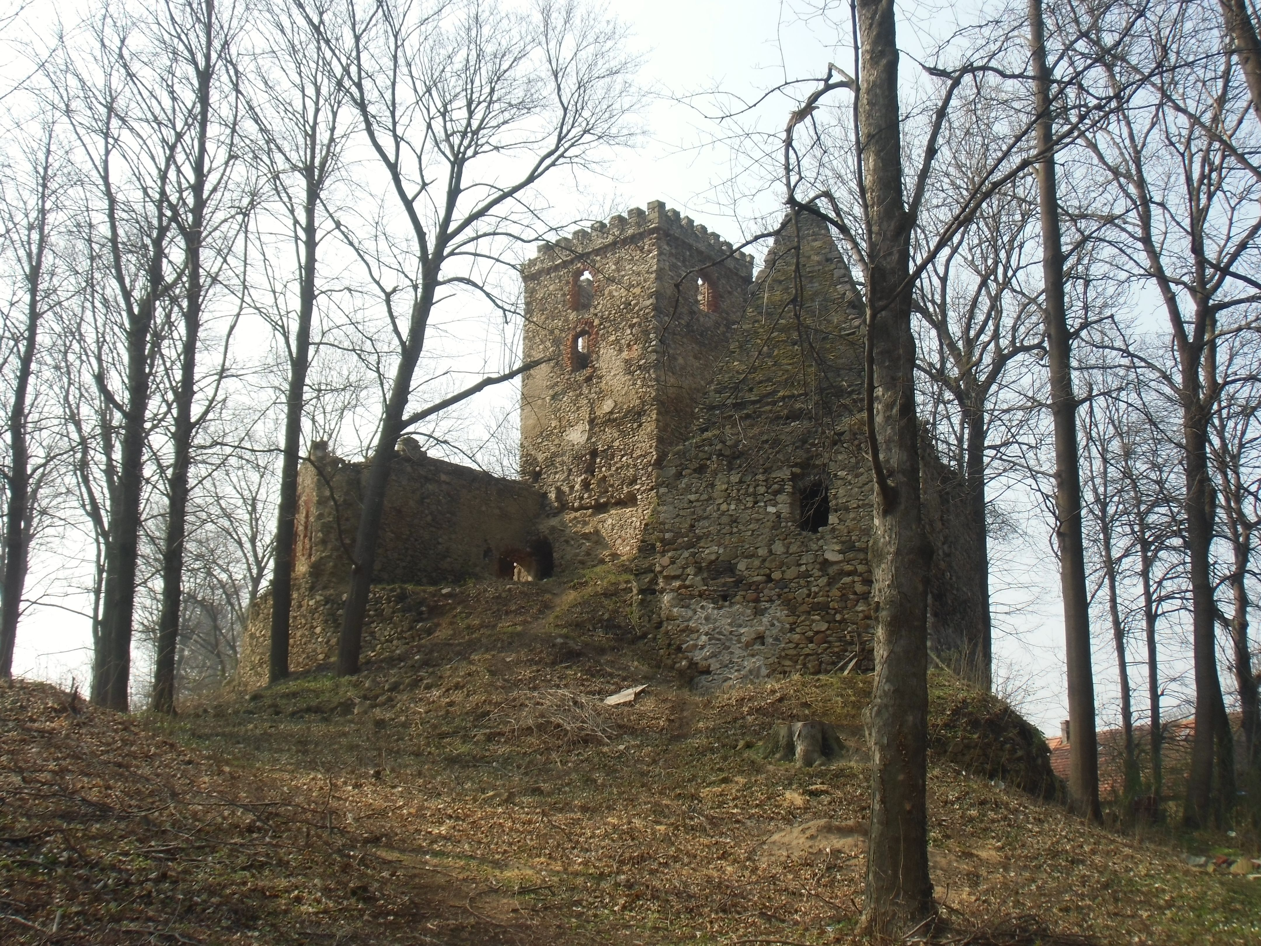 Lipa Górna, zespół zamkowy, XIII, XVII